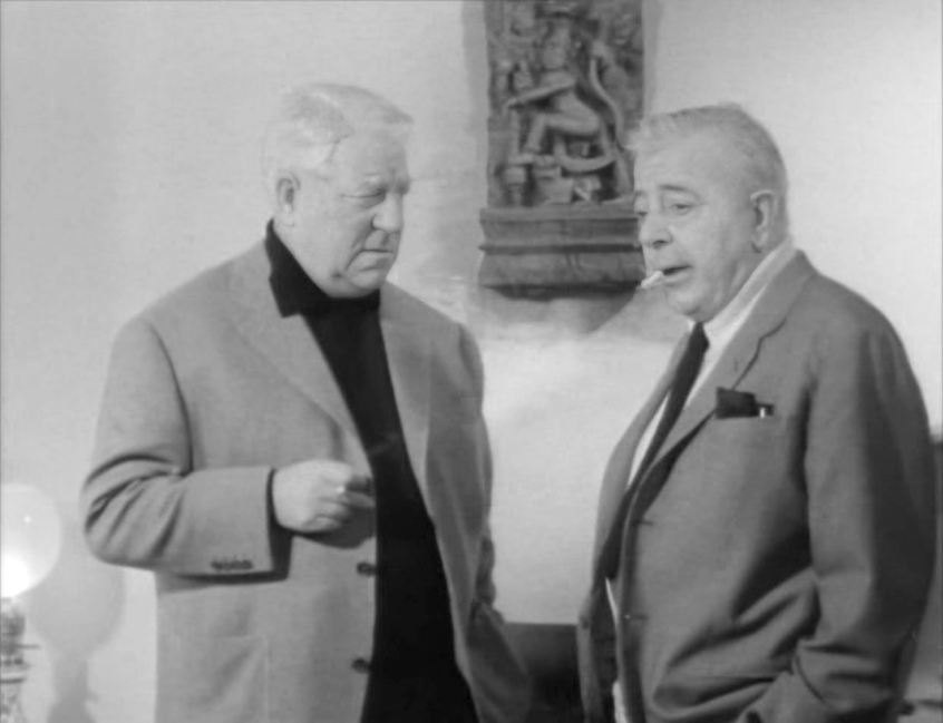 Jean Gabin et Jacques Prévert dans le film Mon frères Jacques, de Pierre Prévert